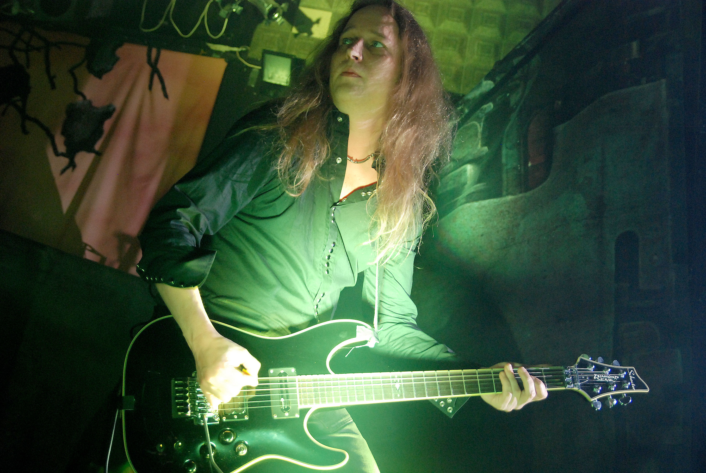 Kreator podczas koncertu w Klubie Studio w Krakowie